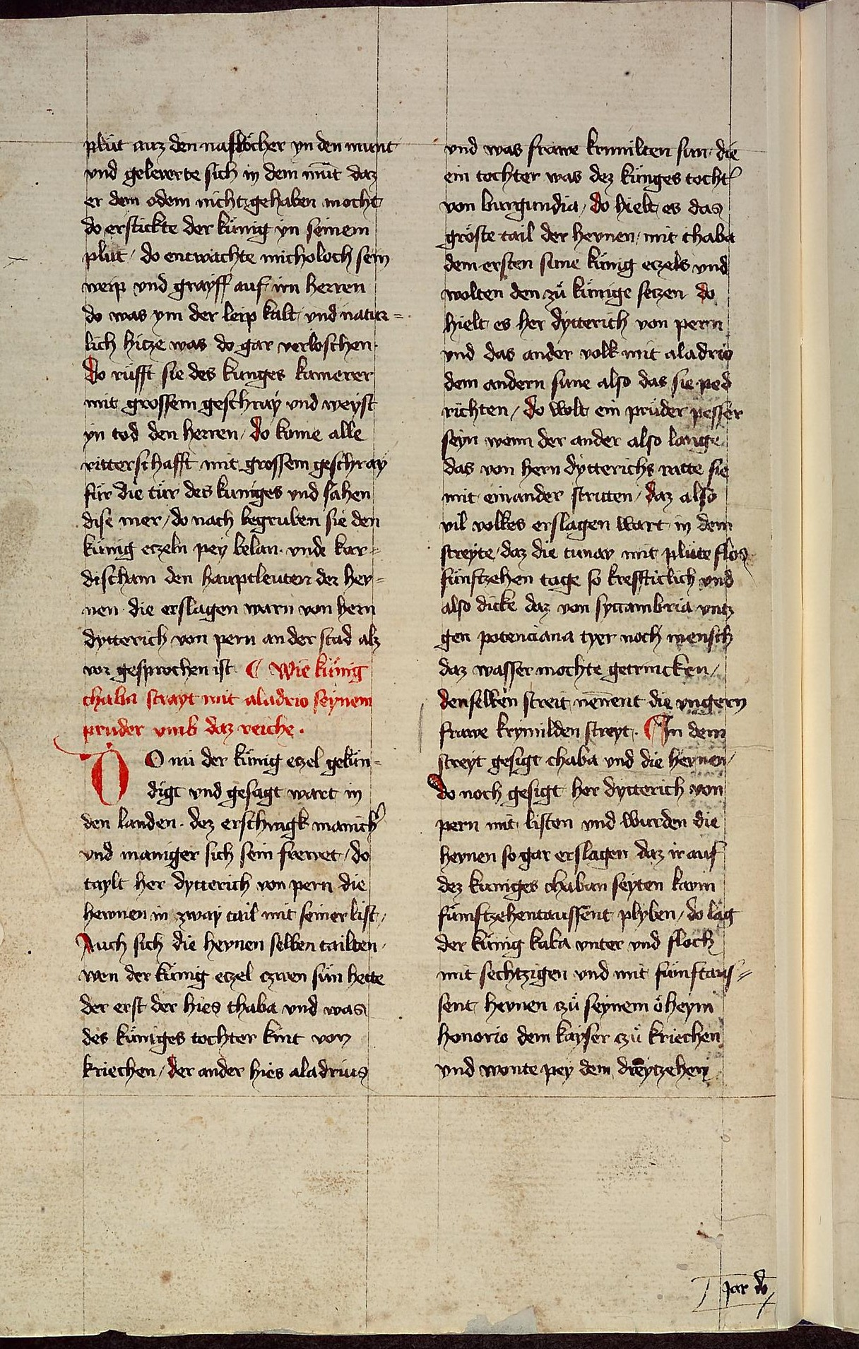 Codex Palatinus germanicus 5, Blatt 35v der Handschrift: Heinrich von Mügeln, "Ungarnchronik" (Beispielblatt mit Reklamante zur Festlegung der Reihenfolge der Lagen, rechts am Fuß der Seite; die beiden Worte sind gleichzeitig die ersten beiden Worte der folgenden Seite, Blatt 36r, vgl. File:Cpg5 Blatt 36r - Heinrich von Mügeln, Ungarnchronik.jpg)